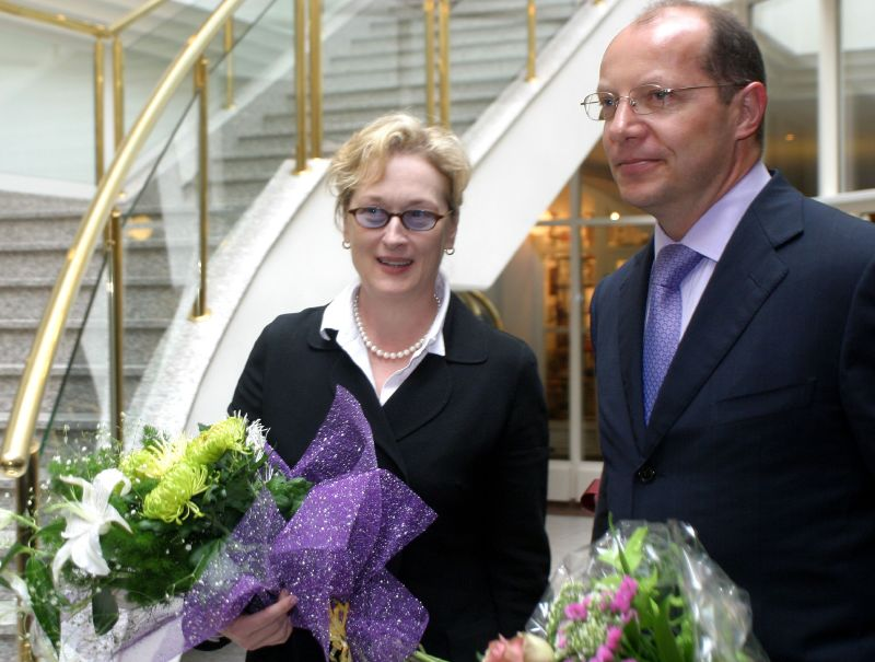 Meryl Streep in St-Petersburg, Russia